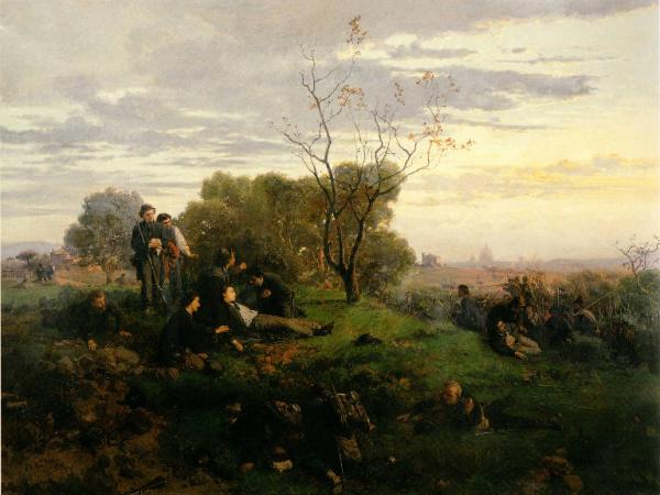 La morte di Enrico Cairoli a Villa Glori, olio su tela, 235 x 181 cm., Musei civici, Pavia